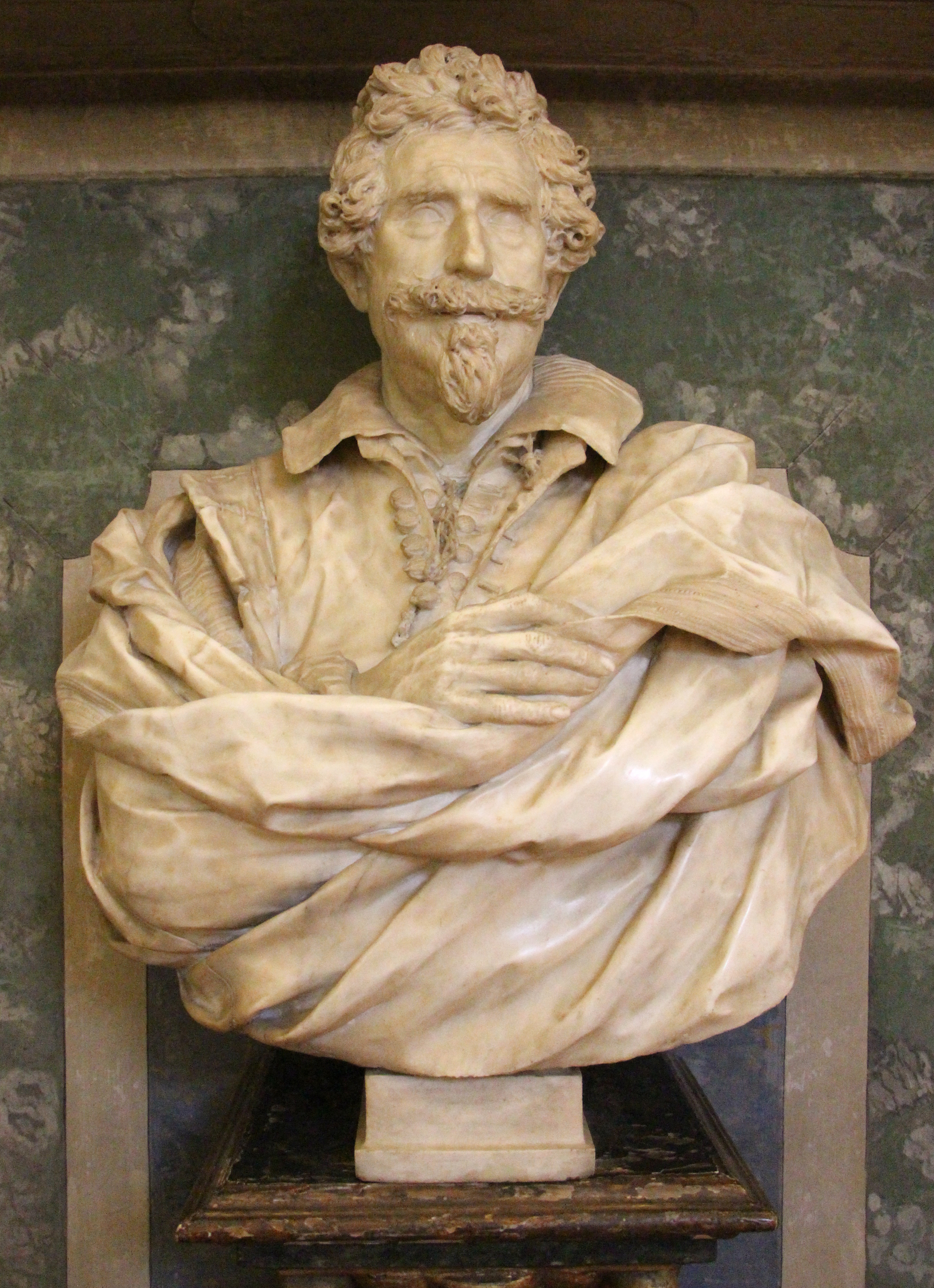 Casa Buonarroti - Camera degli Angioli